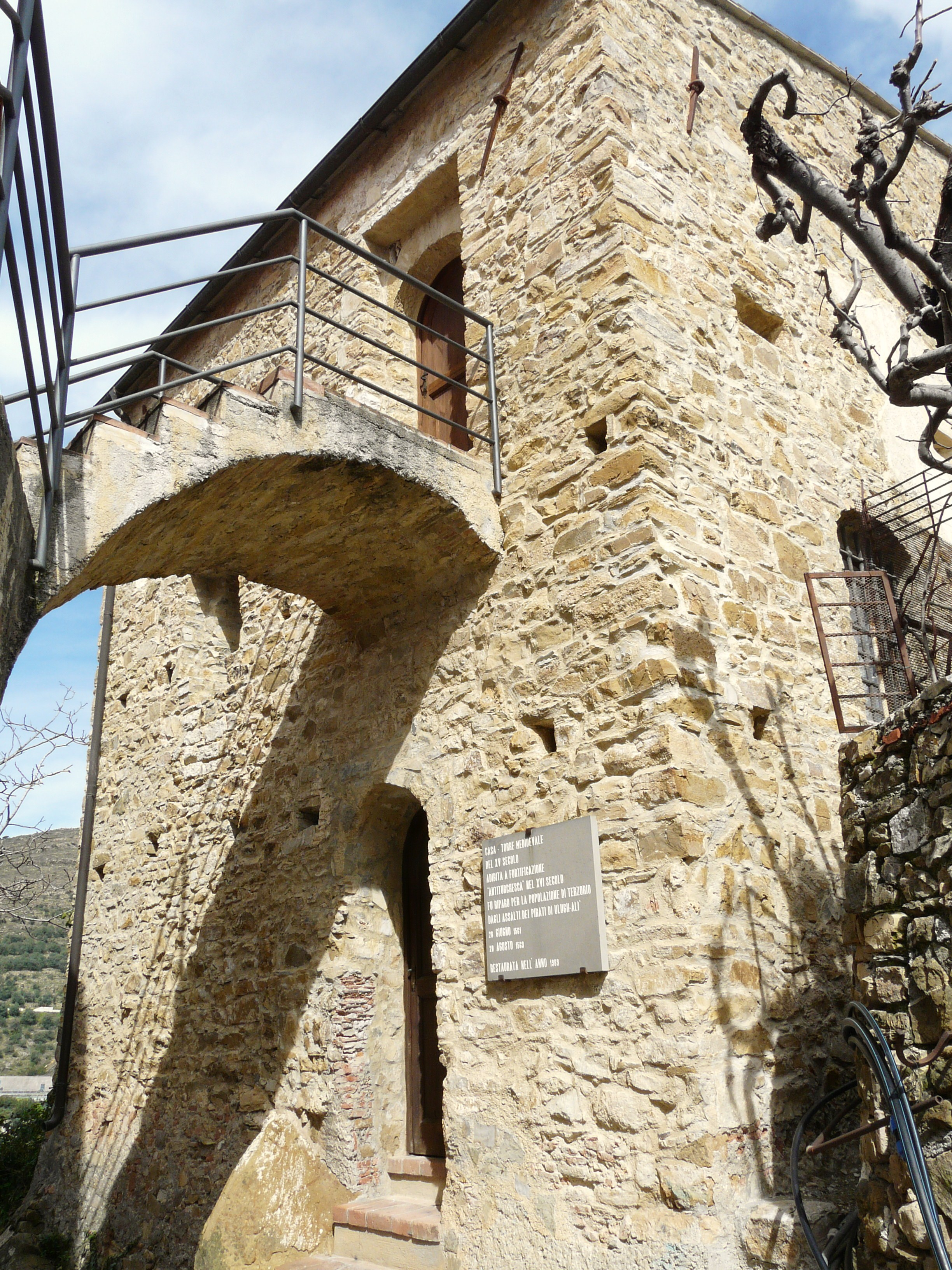 Torre di Terzorio, Liguria, Italia